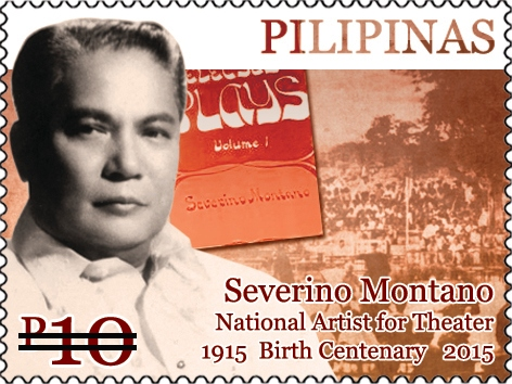 Severino Montano